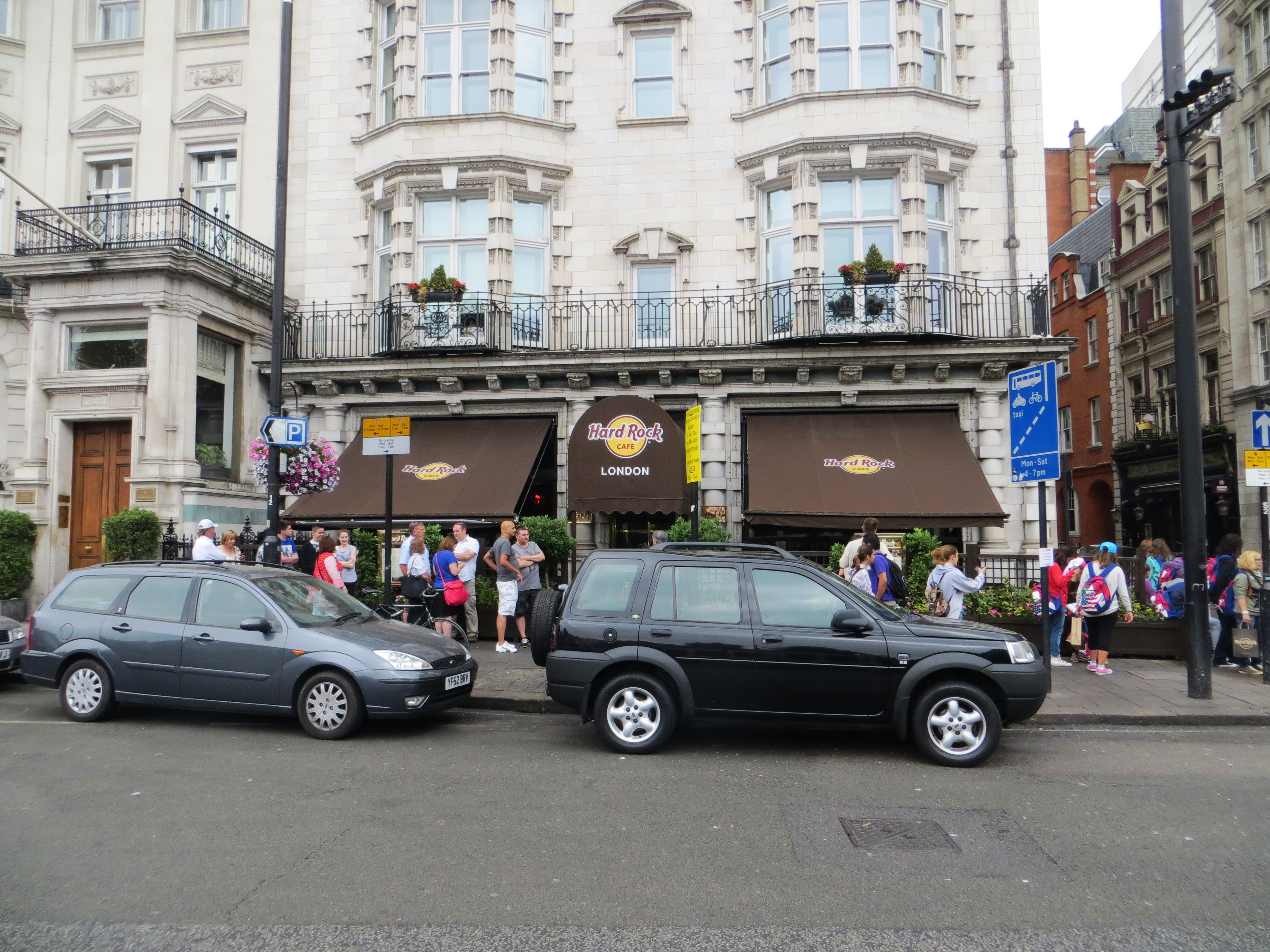 Hard Rock Café Londen